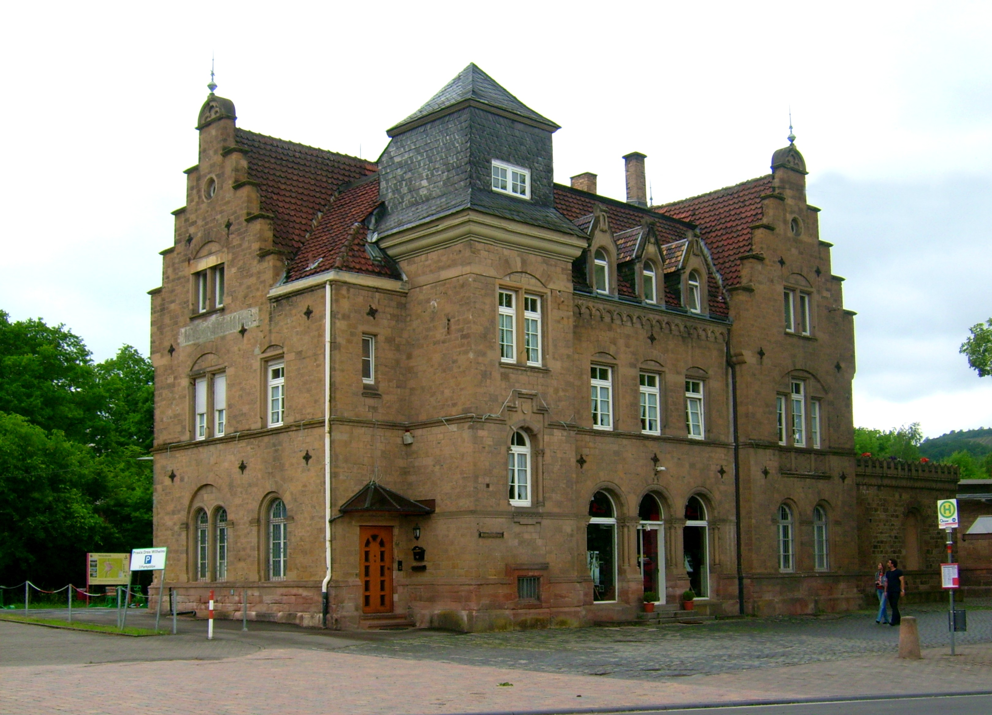 Bahnhof in Meisenheim